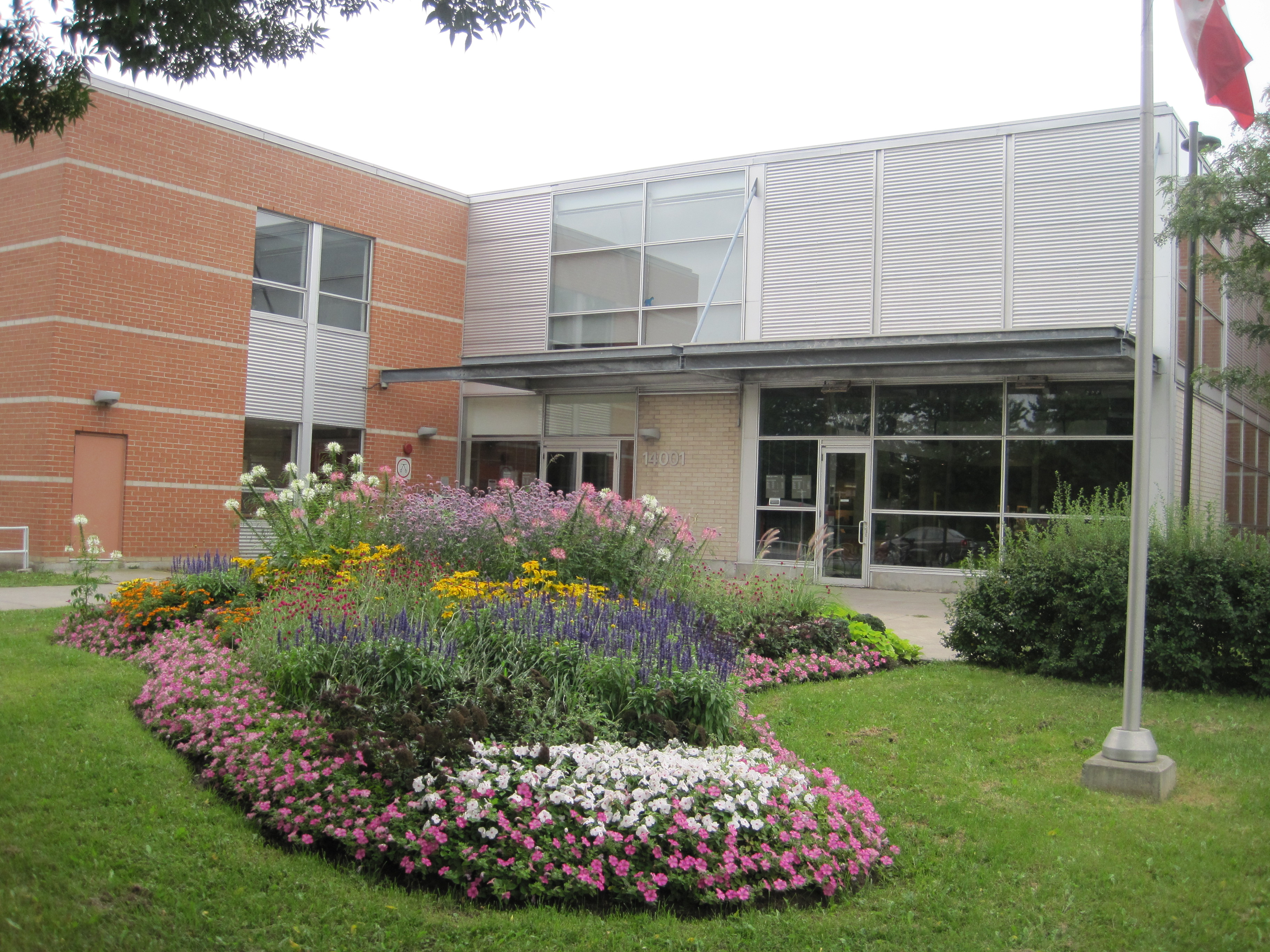 Entrée principale de la Maison de la culture de Pointe-aux-Trembles